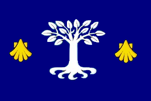 Bandera Municipal de A Pobra do Caramiñal (A Coruña)